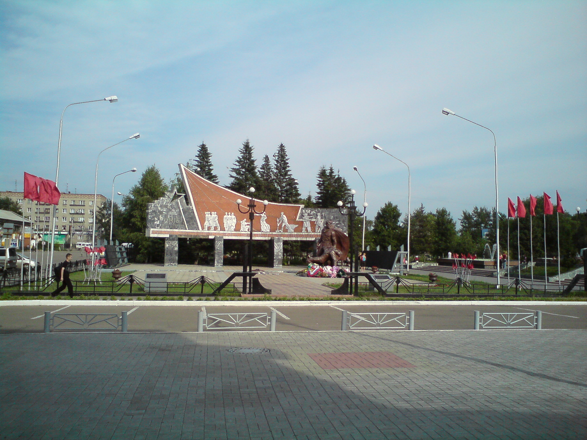 Алтайский край, г.Рубцовск, около ж/д вокзала